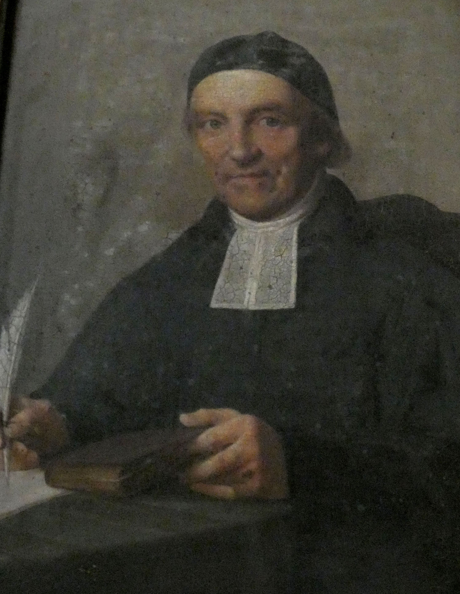 Fotografische Reproduktion (bearb.) eines Porträtgemäldes des Oberpfarrers der Marktkirche Halle Fürchtegott Christian Fulda